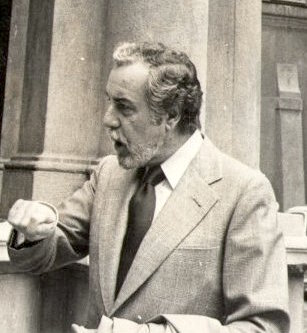 1974 (aprile) a Bologna nel cortile di Palazzo d'Accursio con l'attore spagnolo Fernando Rey, interprete di Augusto Murri nel film "Fatti di gente perbene" di Mauro Bolognini.